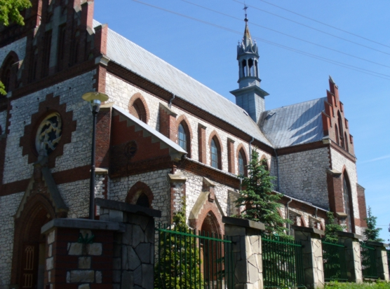 Smardzowice - kościół kościół parafialny p.w. MB Różańcowej i św. Małgorzaty